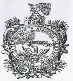 Logo storico dell'Accademia letteraria dei Rinnovati della Fenice di Paternò.